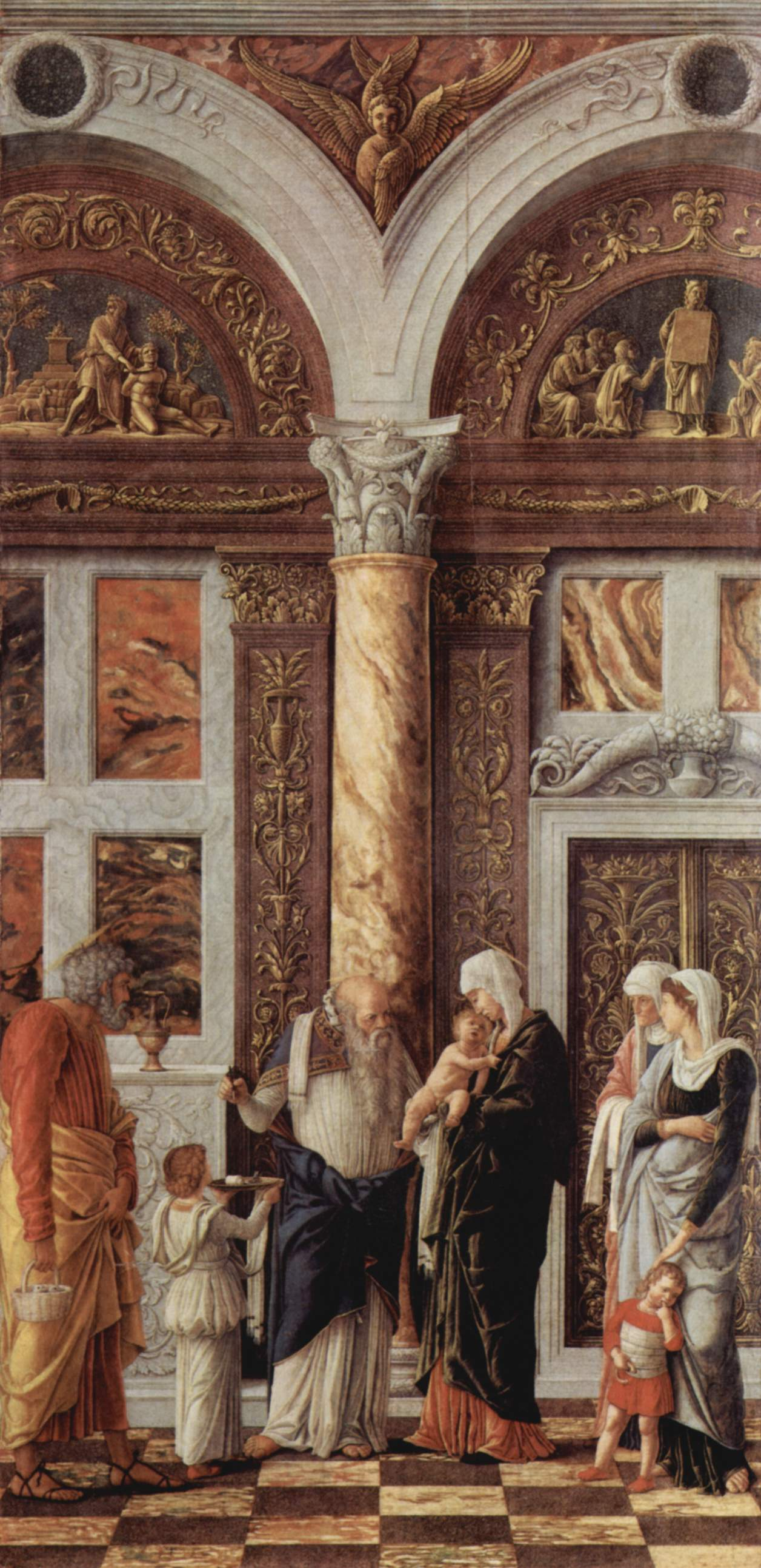 Altarretabel der Palastkapelle des Herzogs von Mantua